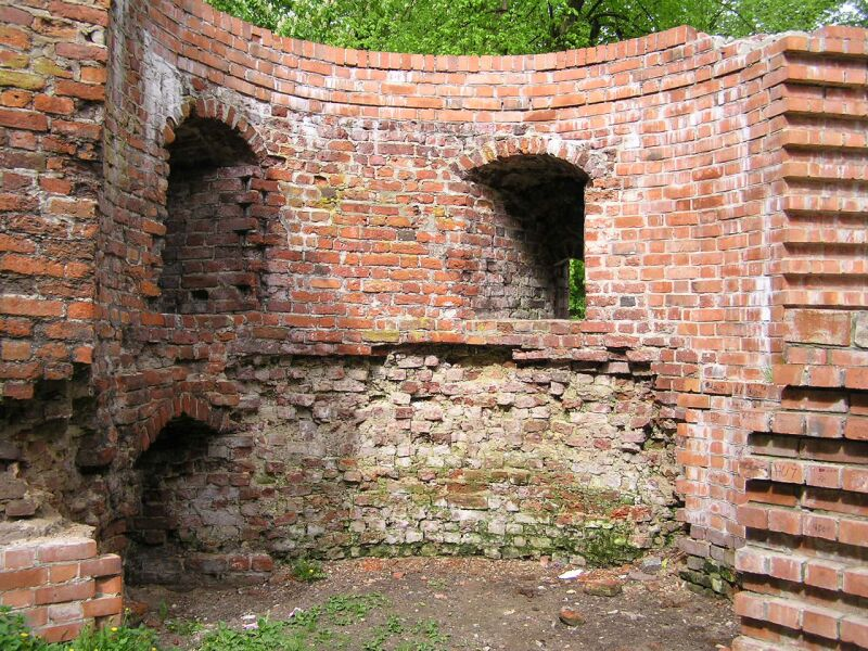 Olsztyn - mury obronne